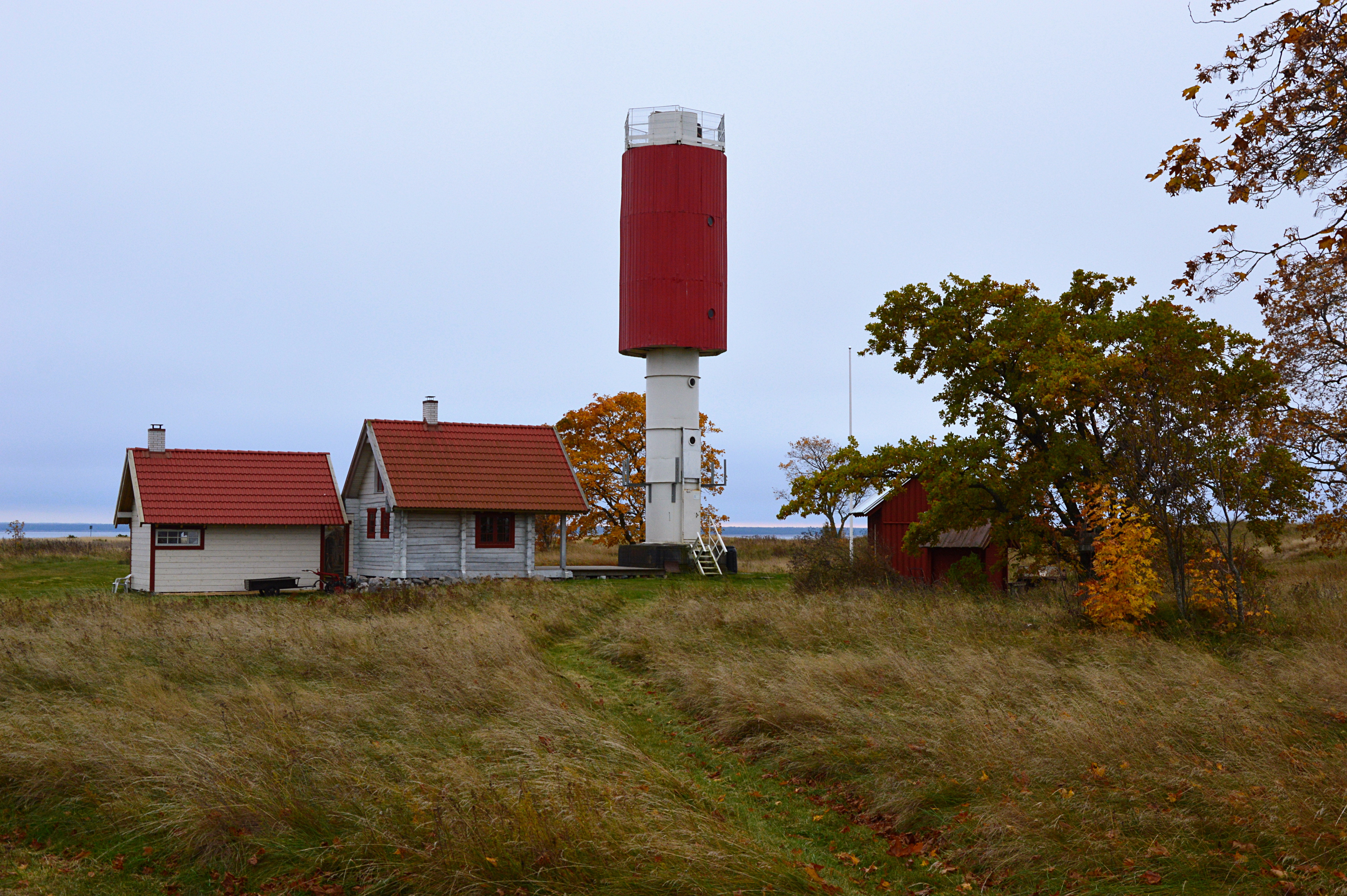 Linnuvaatlustorn Rammu saarel.